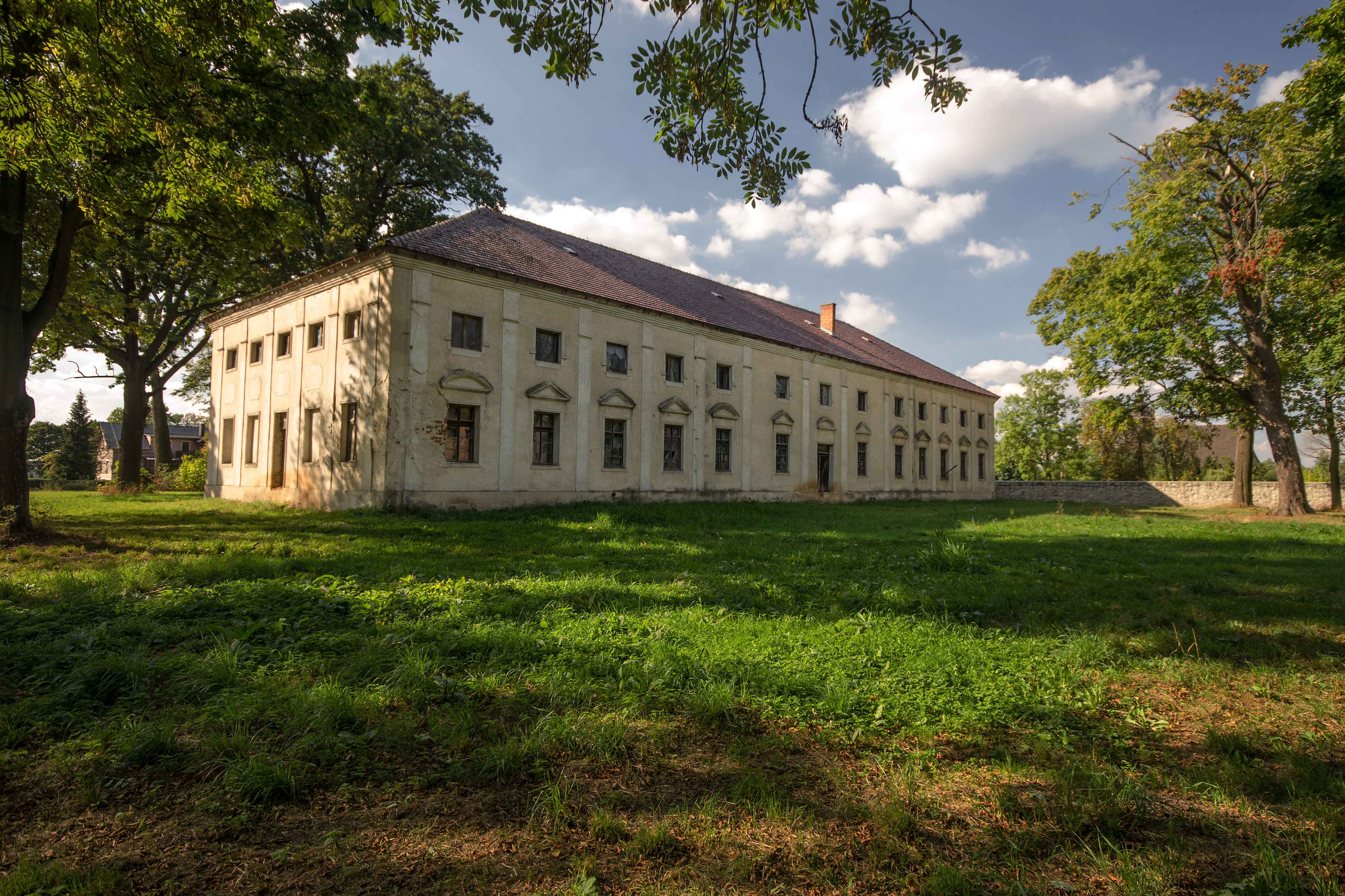 Krzywiczyny, pałac, kon. XVIII